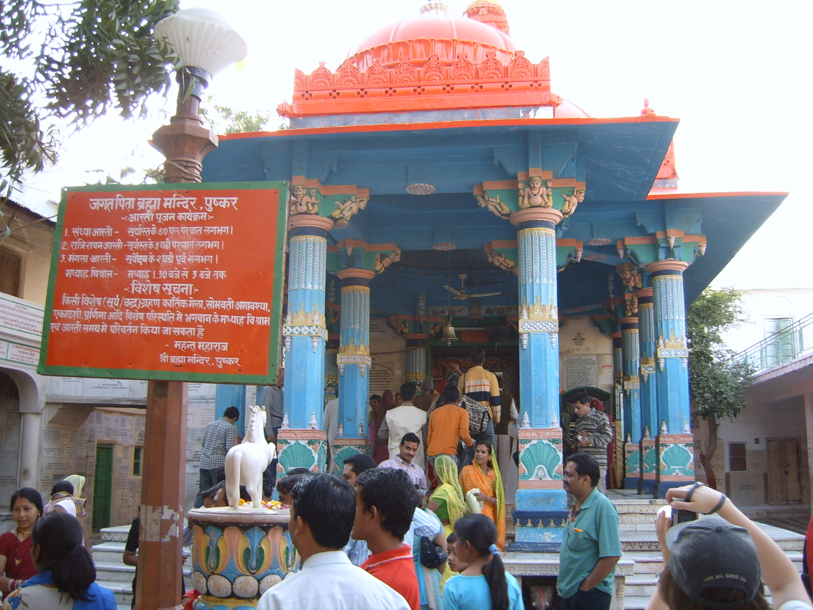 Brahma temple, Pushkar